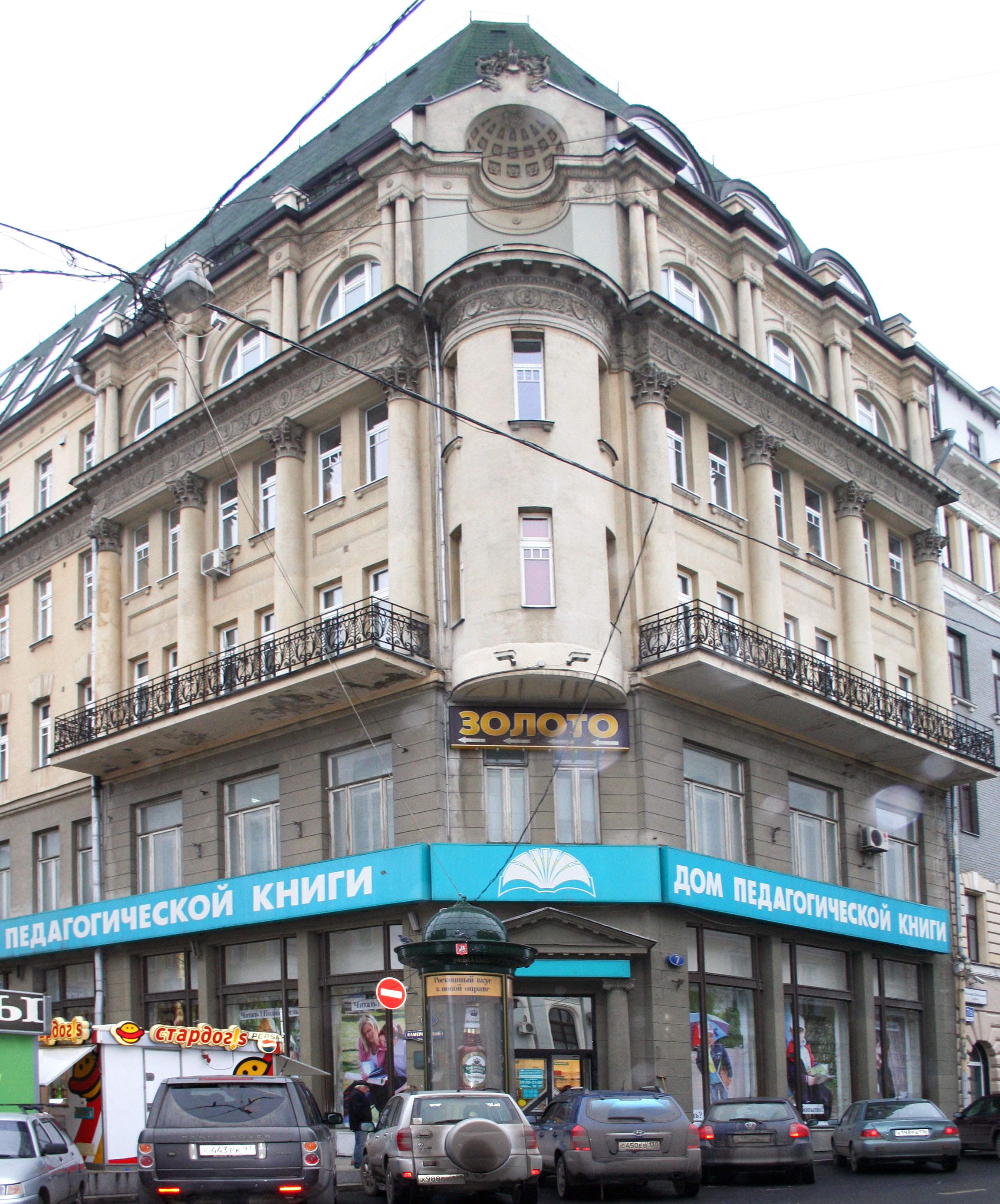 Камергерский переулок, 5/7 стр.1